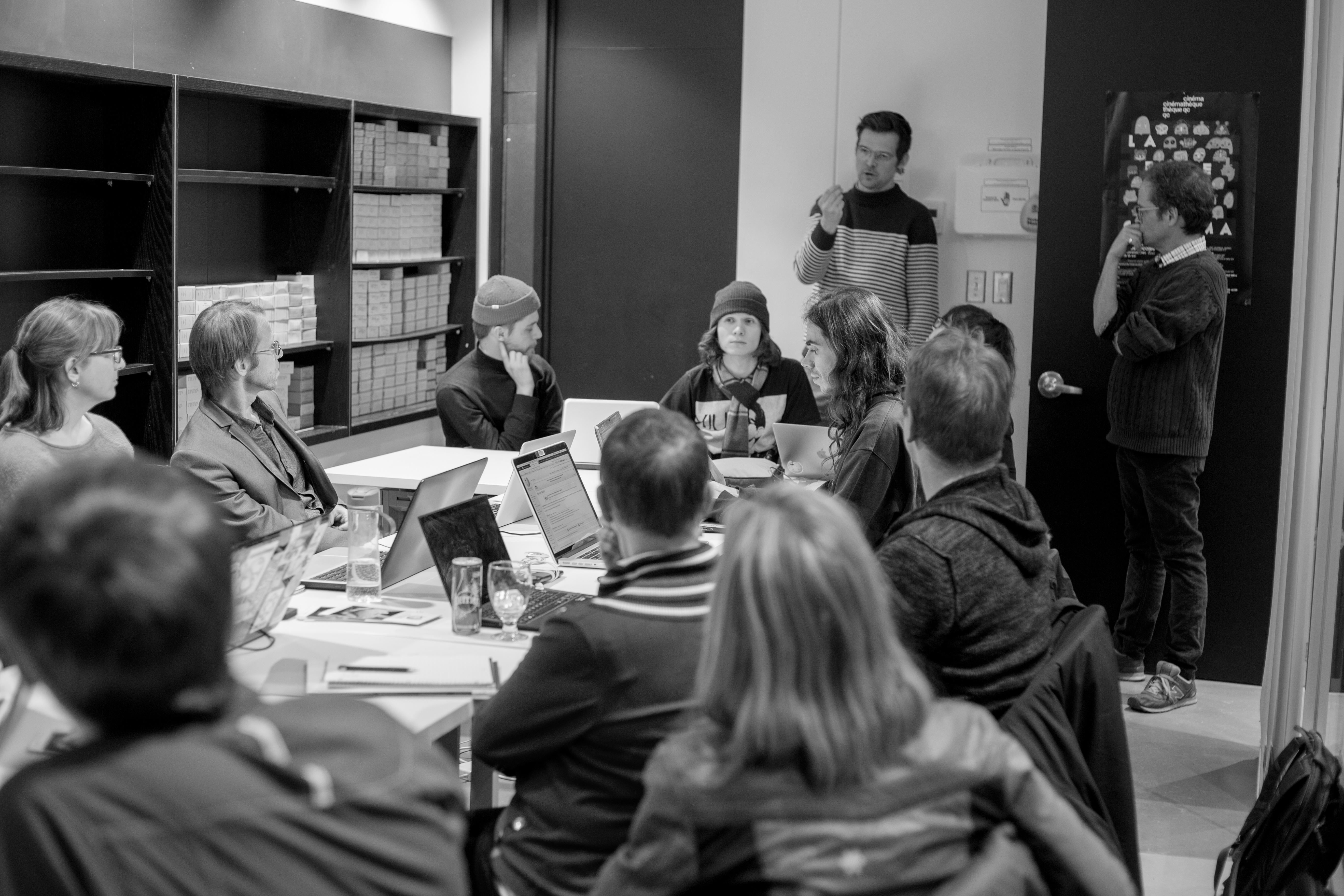 Soiré Wikipédia à la Médiathèque Guy-L.-Côté de la cinémathèque québécoise et portant sur le cinéaste Matthew Rankin.